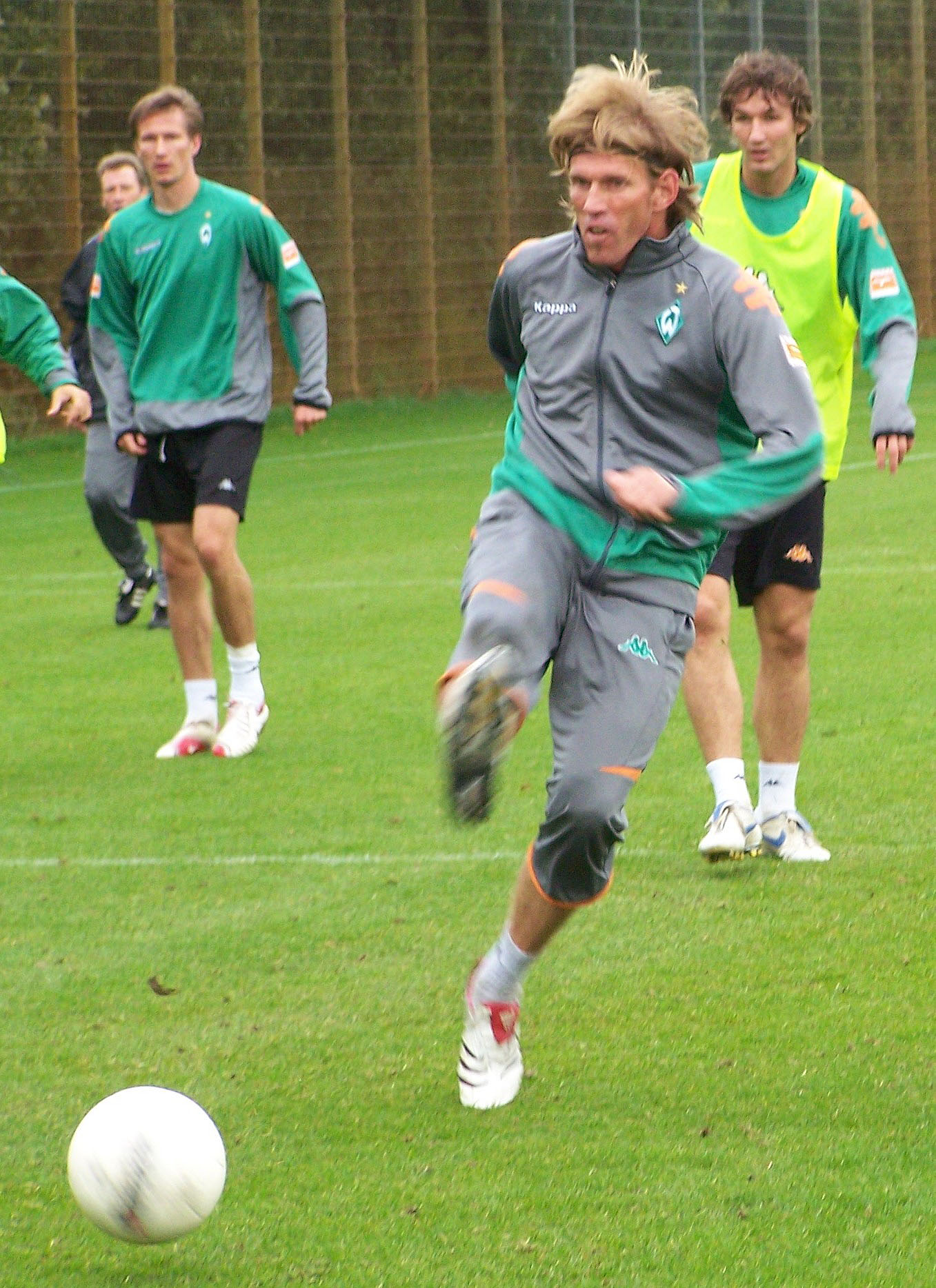 Michael Kraft